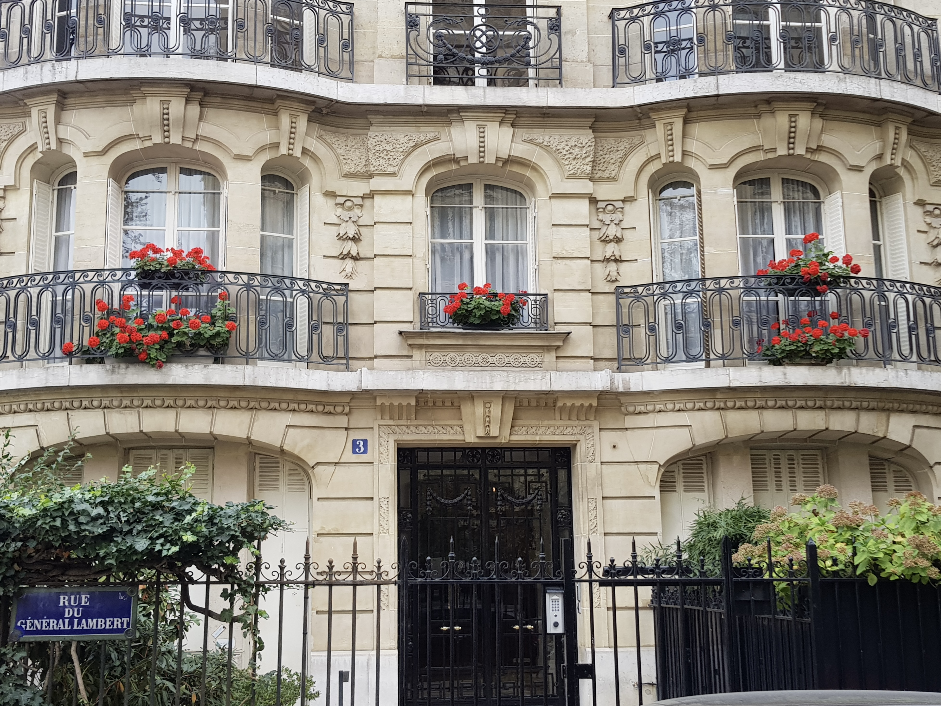 Immeuble du 3, rue du Général-Lambert, Paris 7e.